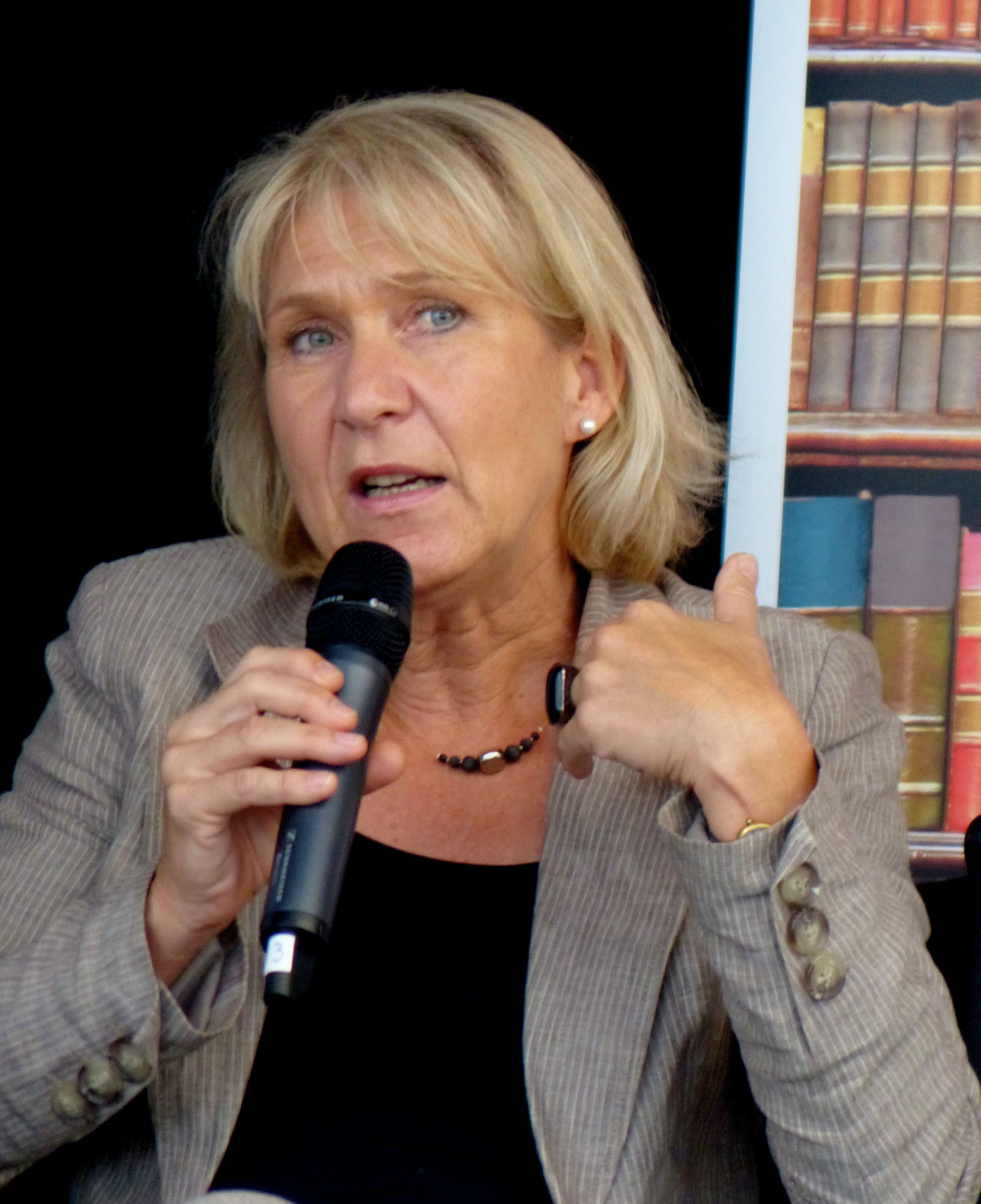 Prof. Dr. Caja Thimm beim "Dialog an Deck" auf der MS Wissenschaft, am 2. Juli 2014 in Bonn